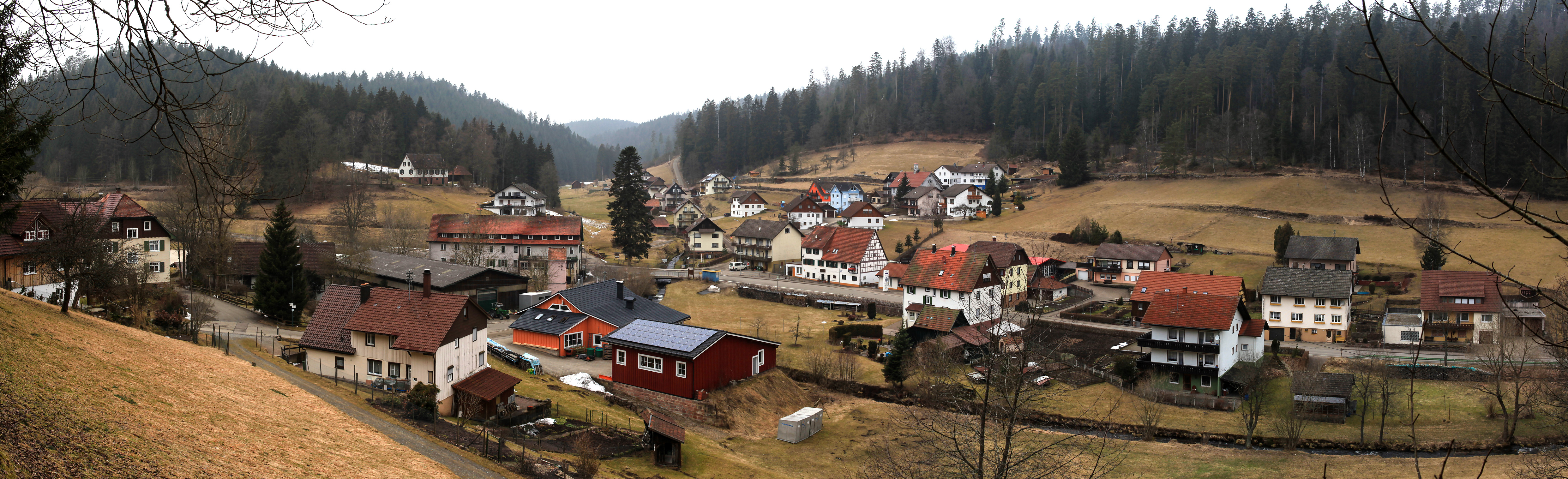 Blick über den Ortsteil Gompelscheuer der Gemeinde Enzklösterle